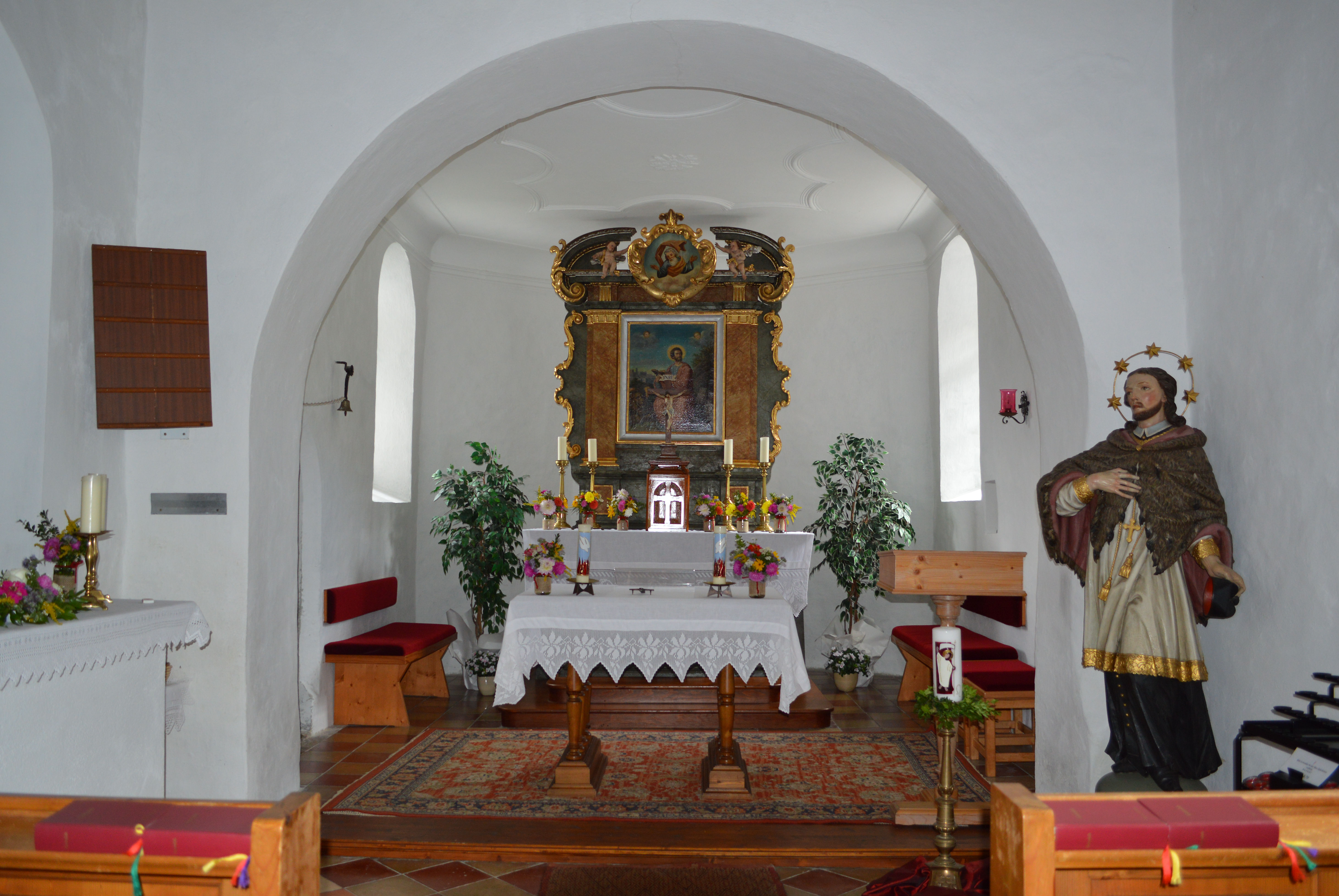 Kath. Pfarrkirche hl. Markus in Amlach, Standort Unteramlach, Spittal an der Drau, Kärnten, Österreich